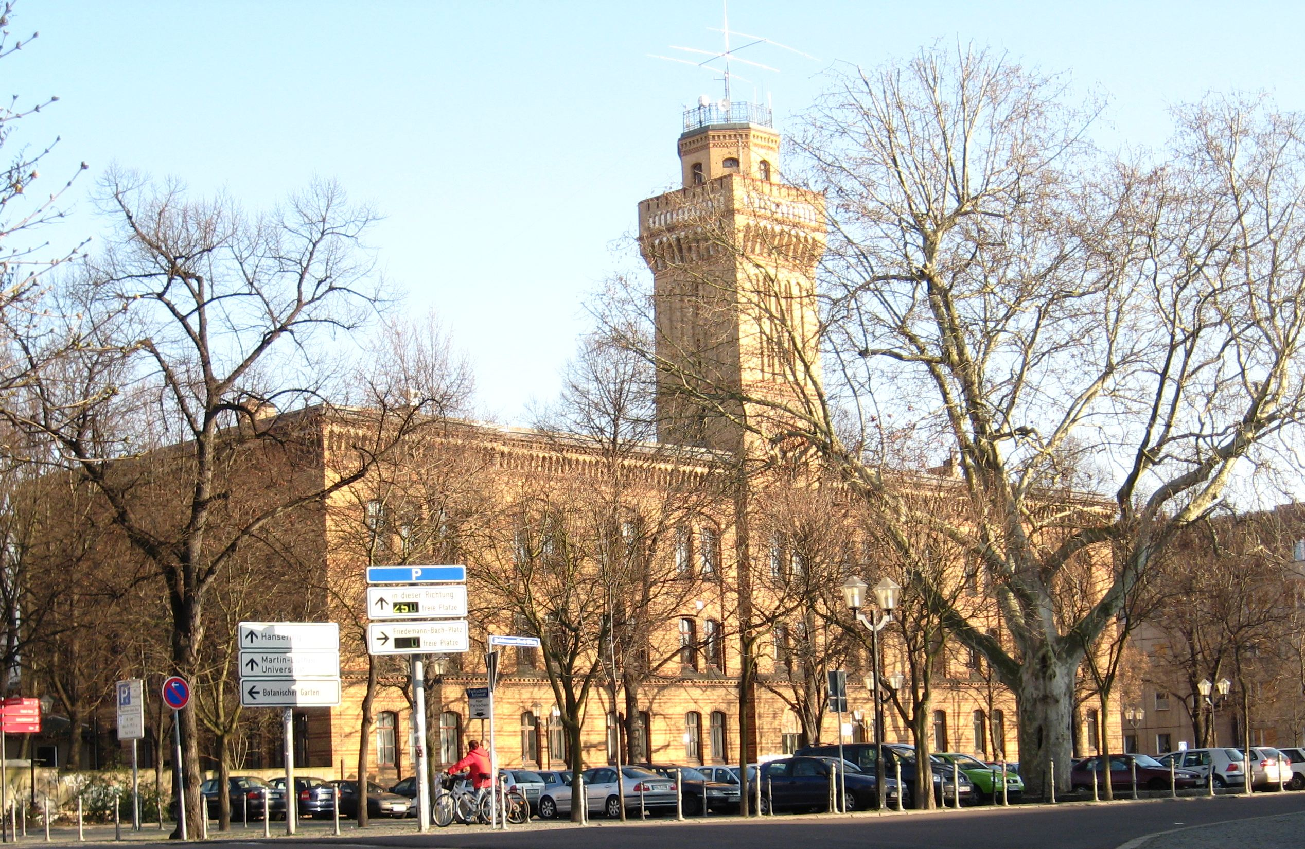 Ehemaliges Physikalisches Institut der Martin-Luther-Universität Halle-Wittenberg in Halle (Saale) am Friedemann-Bach-Platz